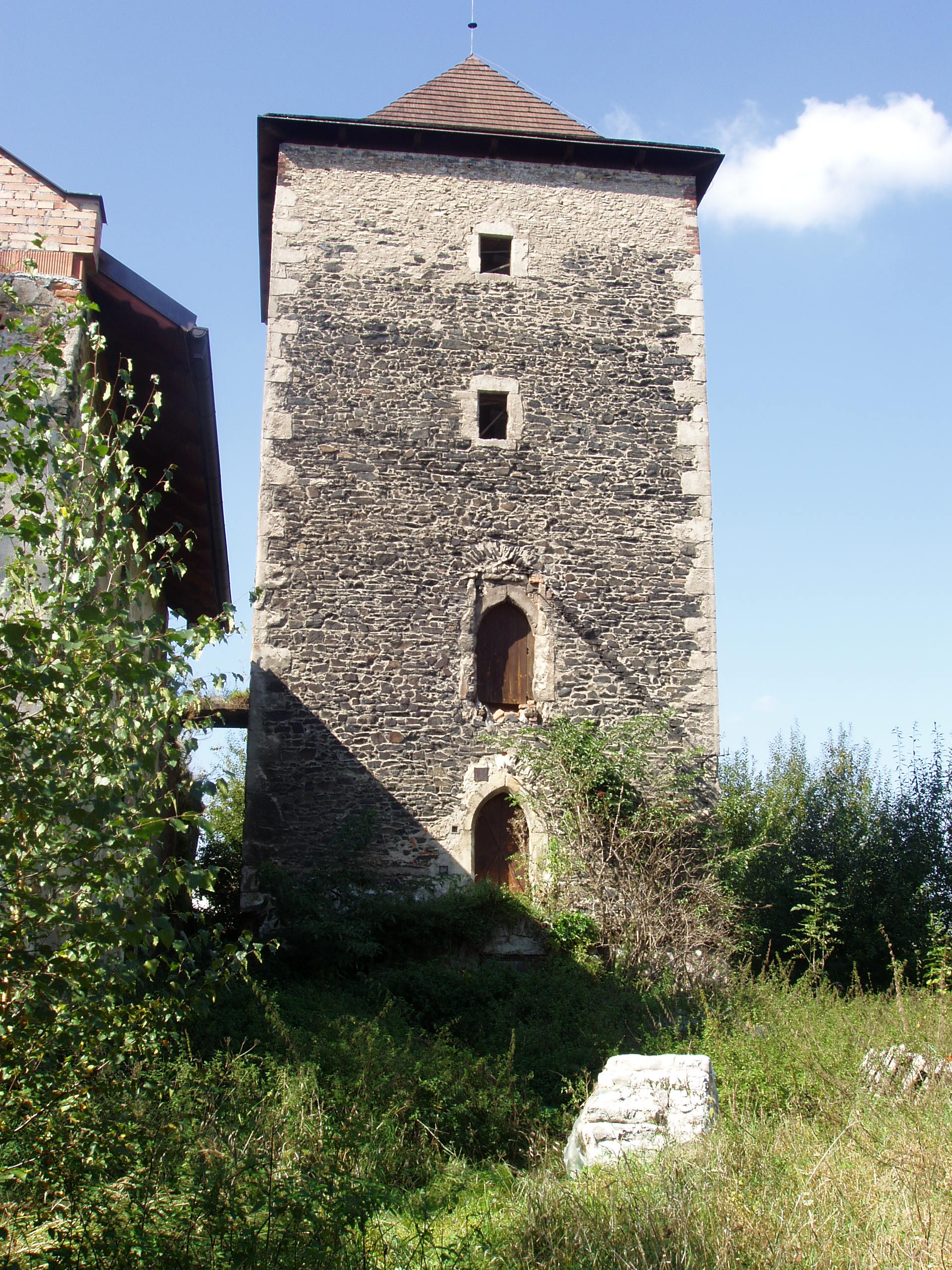 Tvrz (Lošany), nalevo od silnice k Radovesnici, Lošany